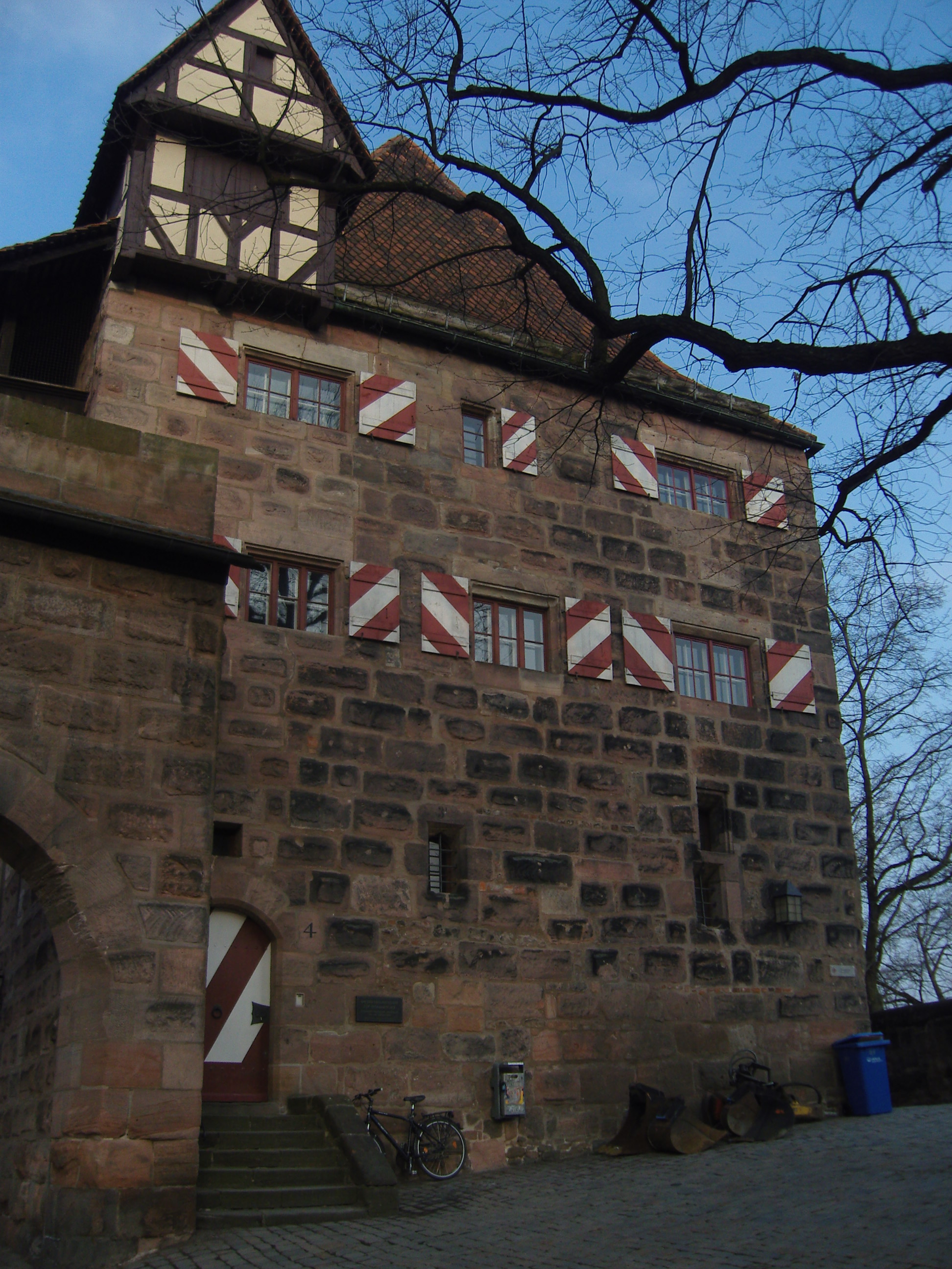 Burgamtshauptmannhaus der Burggrafenburg in Nürnberg